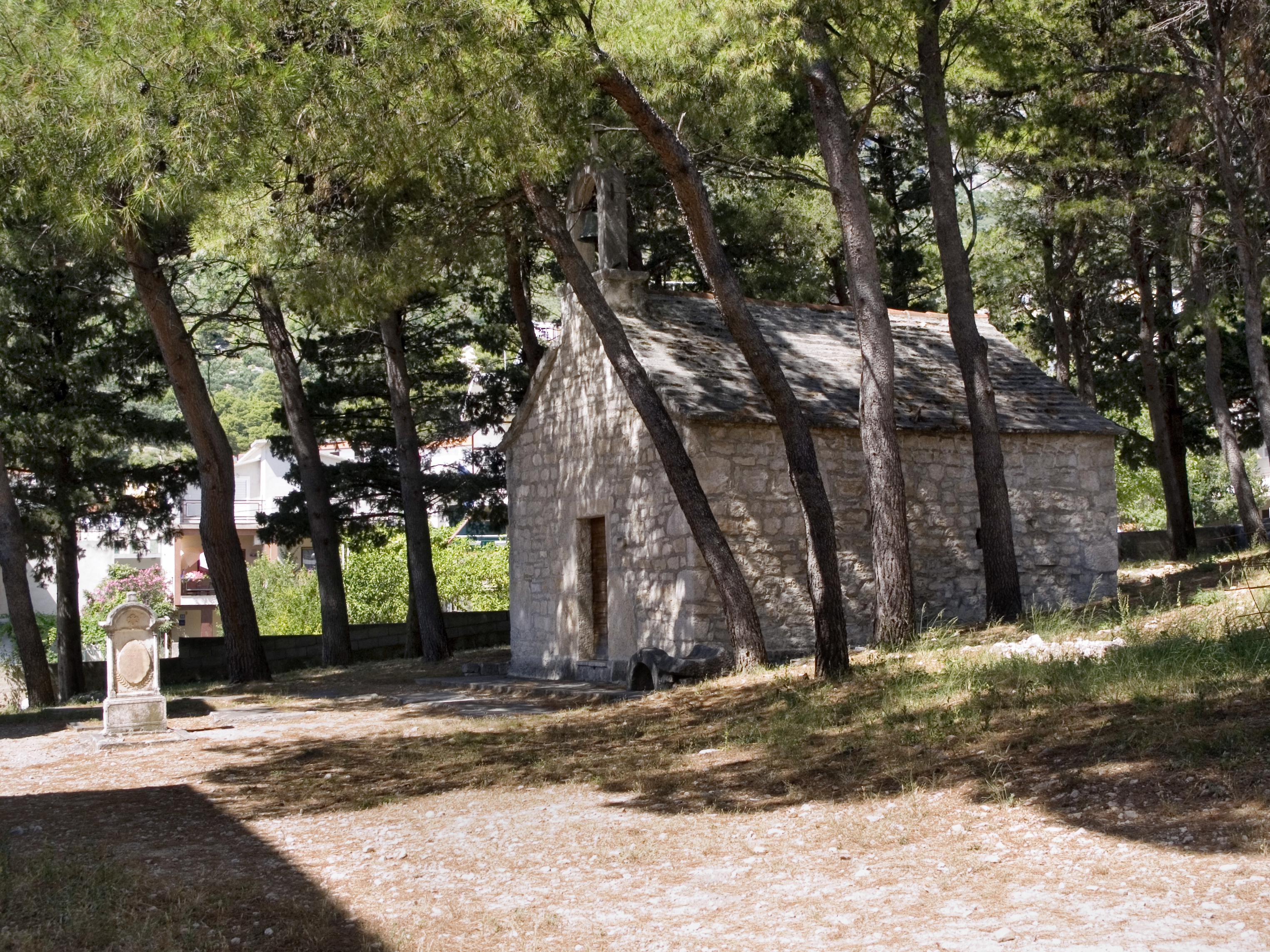 Хорватия, Башка Вода, Церковь Святого Ловро